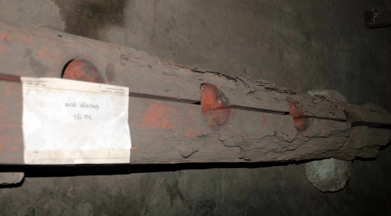 கால் விலங்கு - தொல் பொருட்காட்சிச்சாலை, யாழ்ப்பாணம்